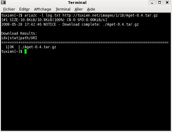 capture écran logiciel aria2